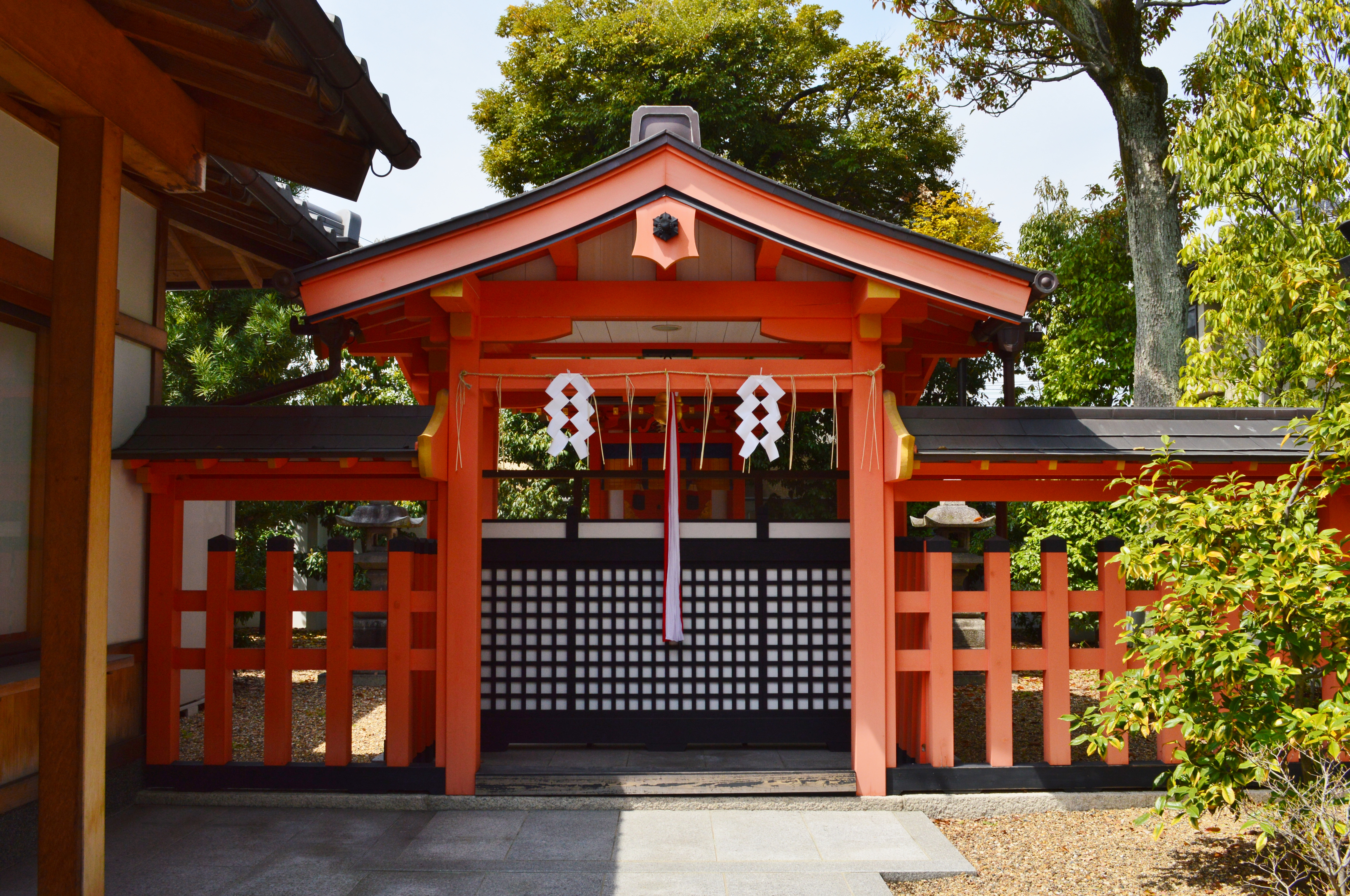 田中神社 (京都市東山区) 本殿 Nikon D3200